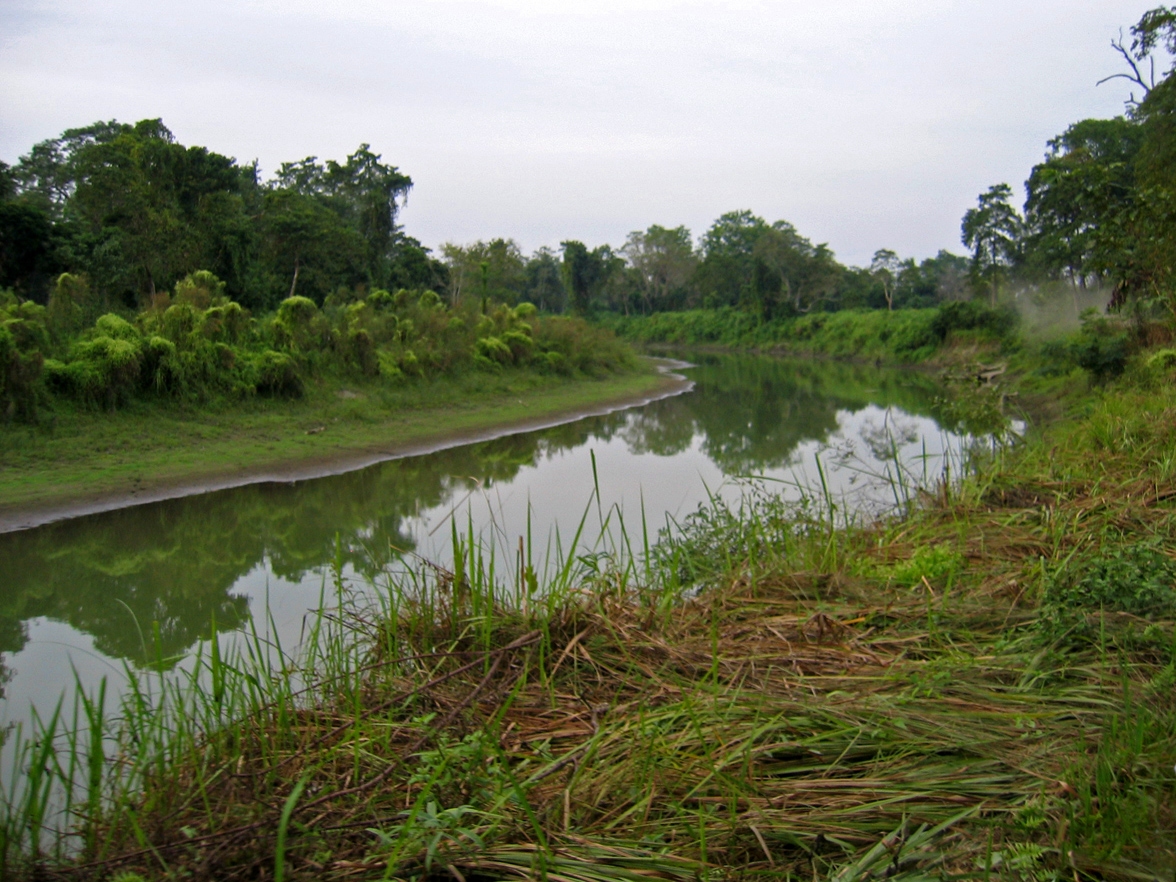 Kaziranga National Park